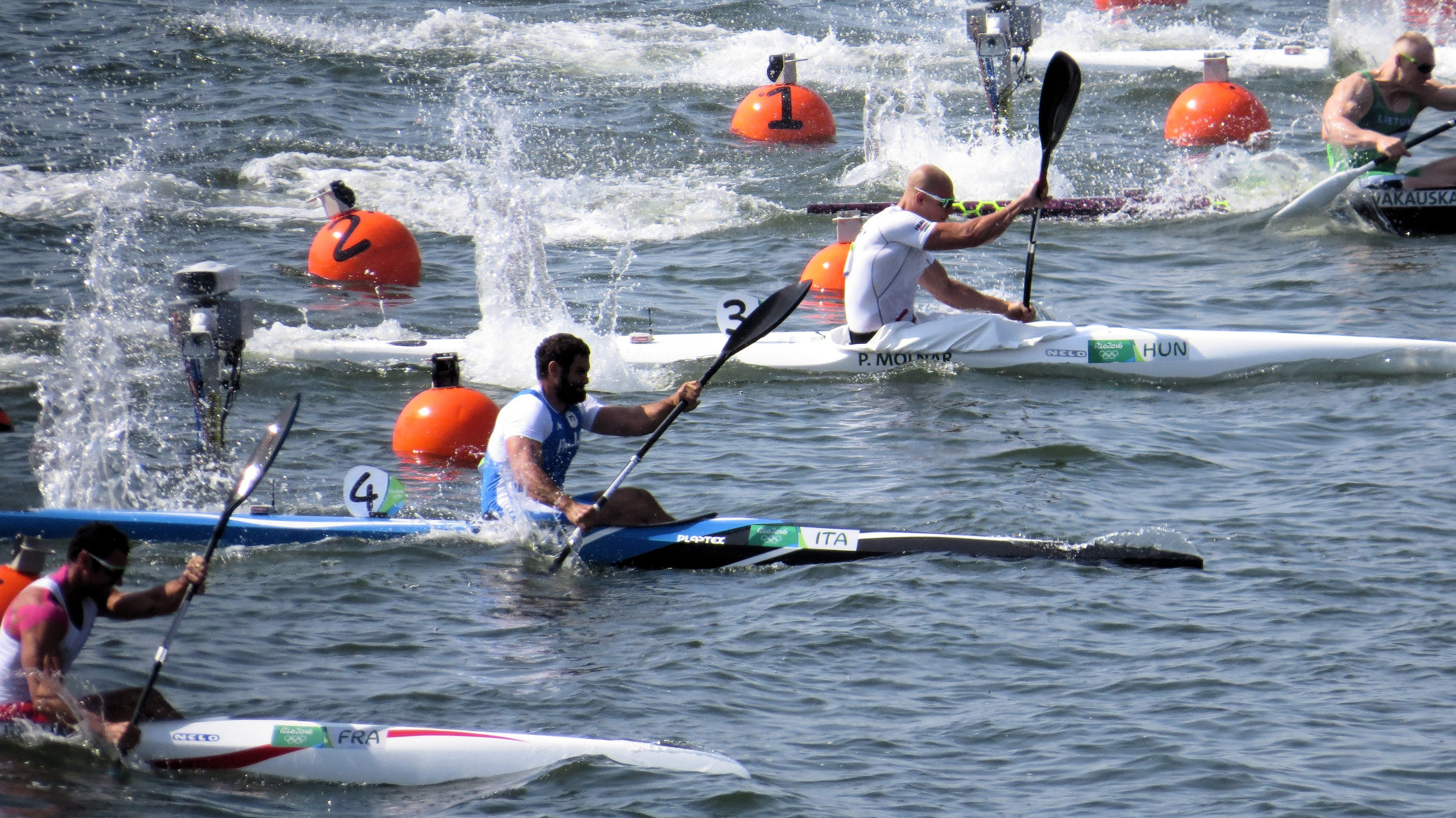 Sx50